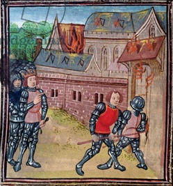 Vilém II. Anglický